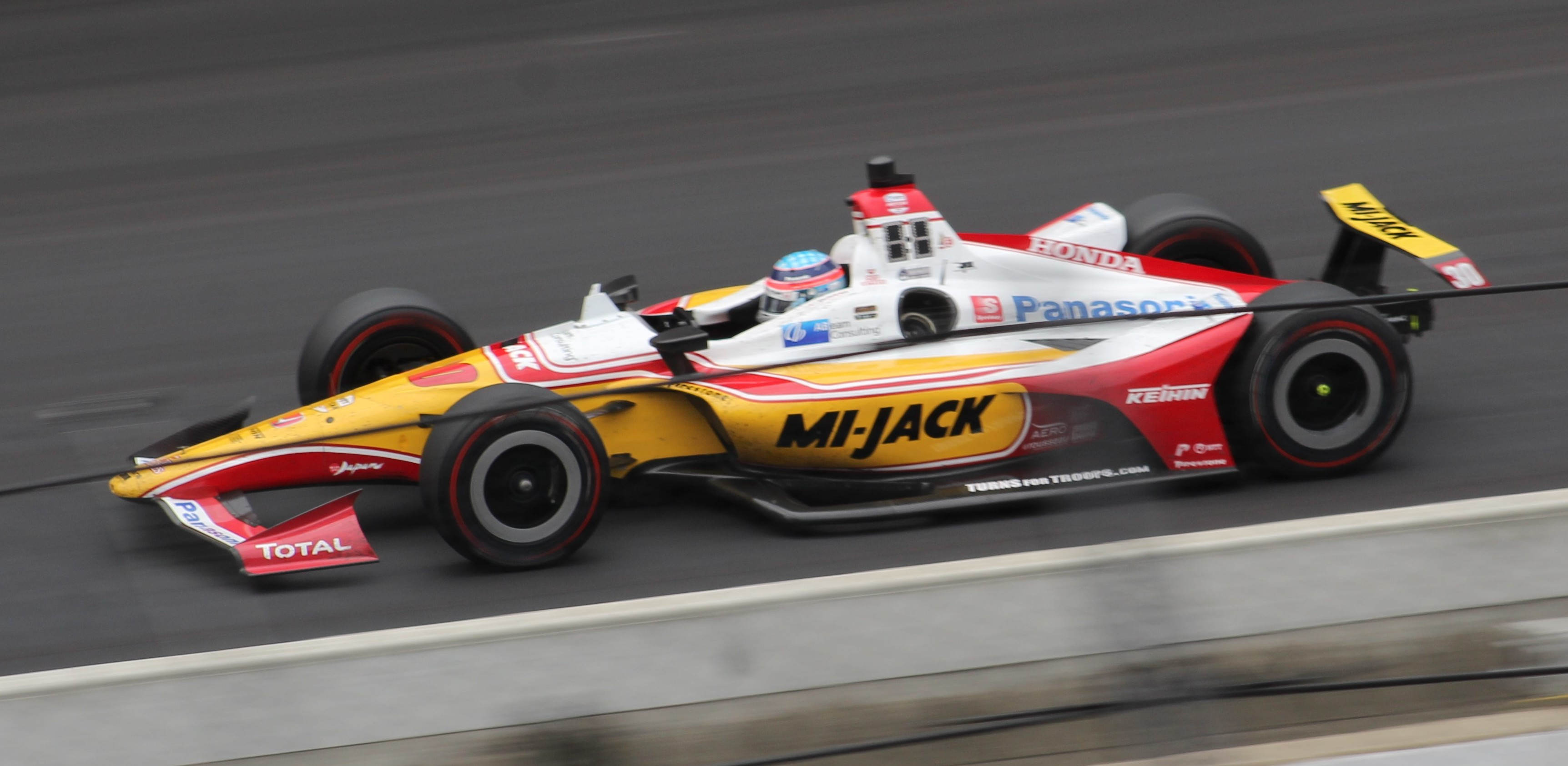 2019 Indianapolis 500